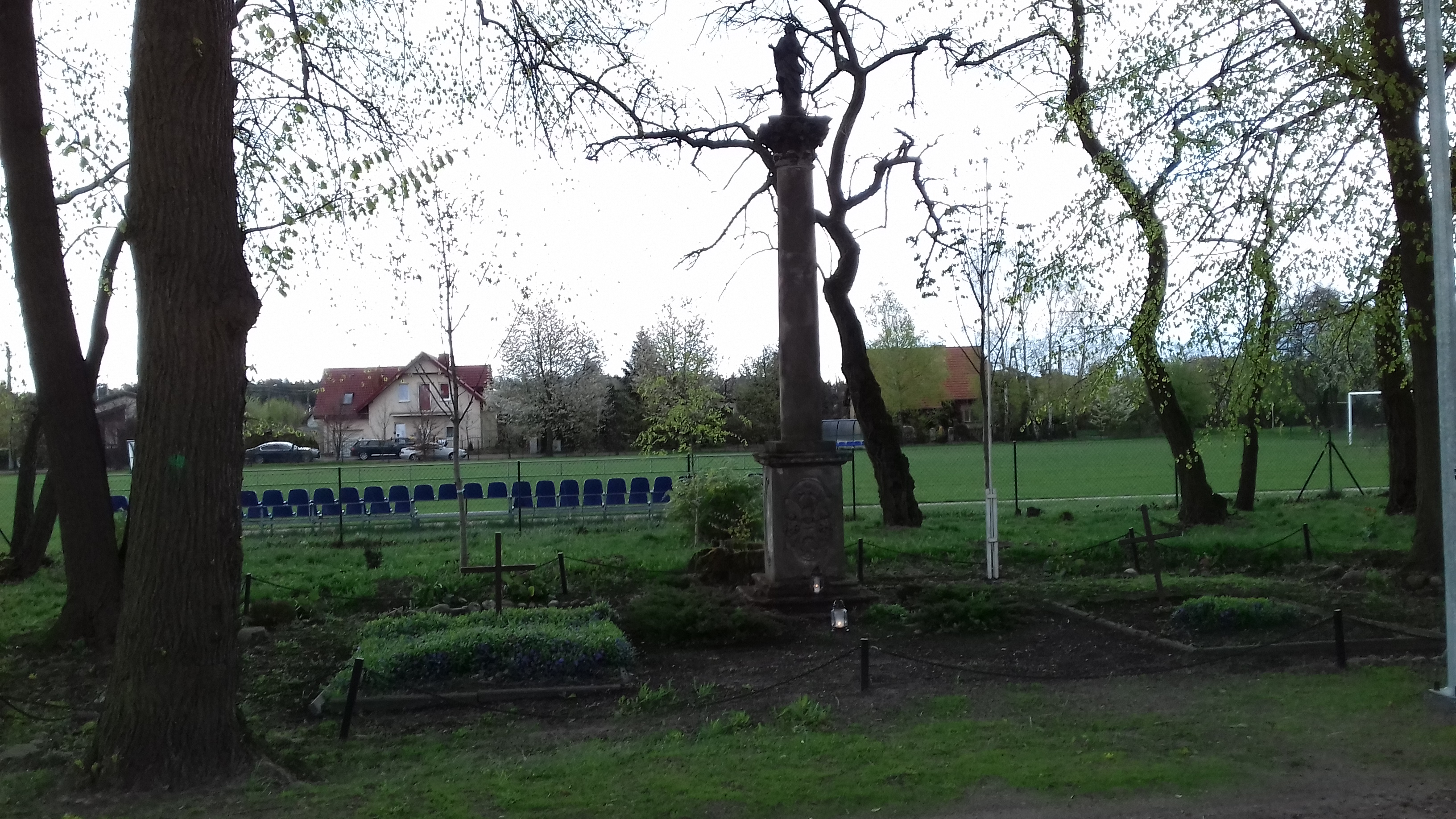 Pomnik i groby polskich żołnierzy poległych w Rogalinie w 1848 r. Rogalin, zbieg ulic Poznańskiej i Kosynierów.